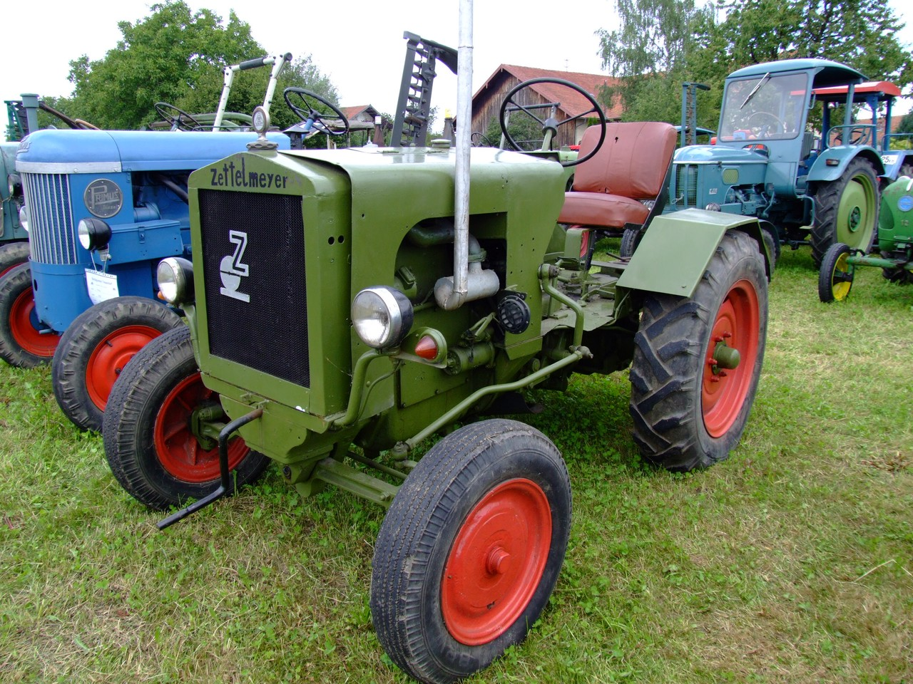 Zettelmeyer-Schlepper Z1 mit 22 PS, Baujahr 1941, Leergewicht: 1680 kg, Hubraum: 2200 ccm, Achsdruck vorne: 660 kg, Achsdruck hinten: 1320 kg